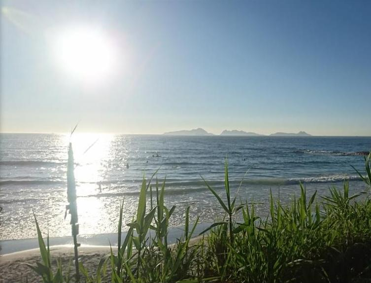 Playa de As Canas2